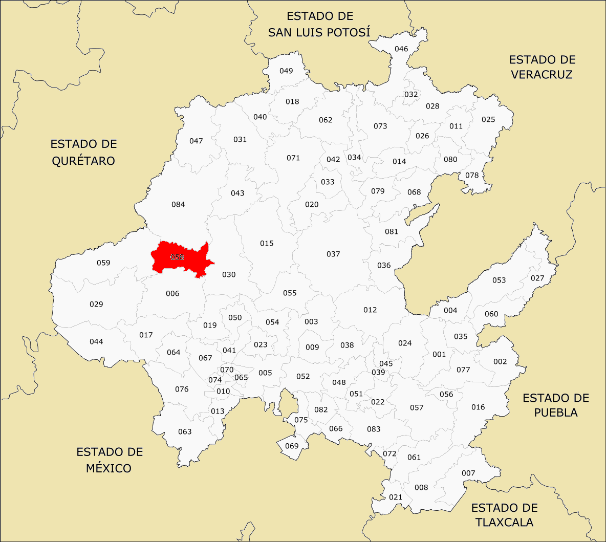 Municipio de Hidalgo